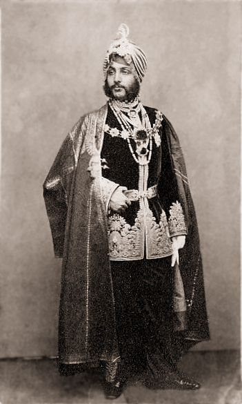 Dalip Singh Sukerchakia